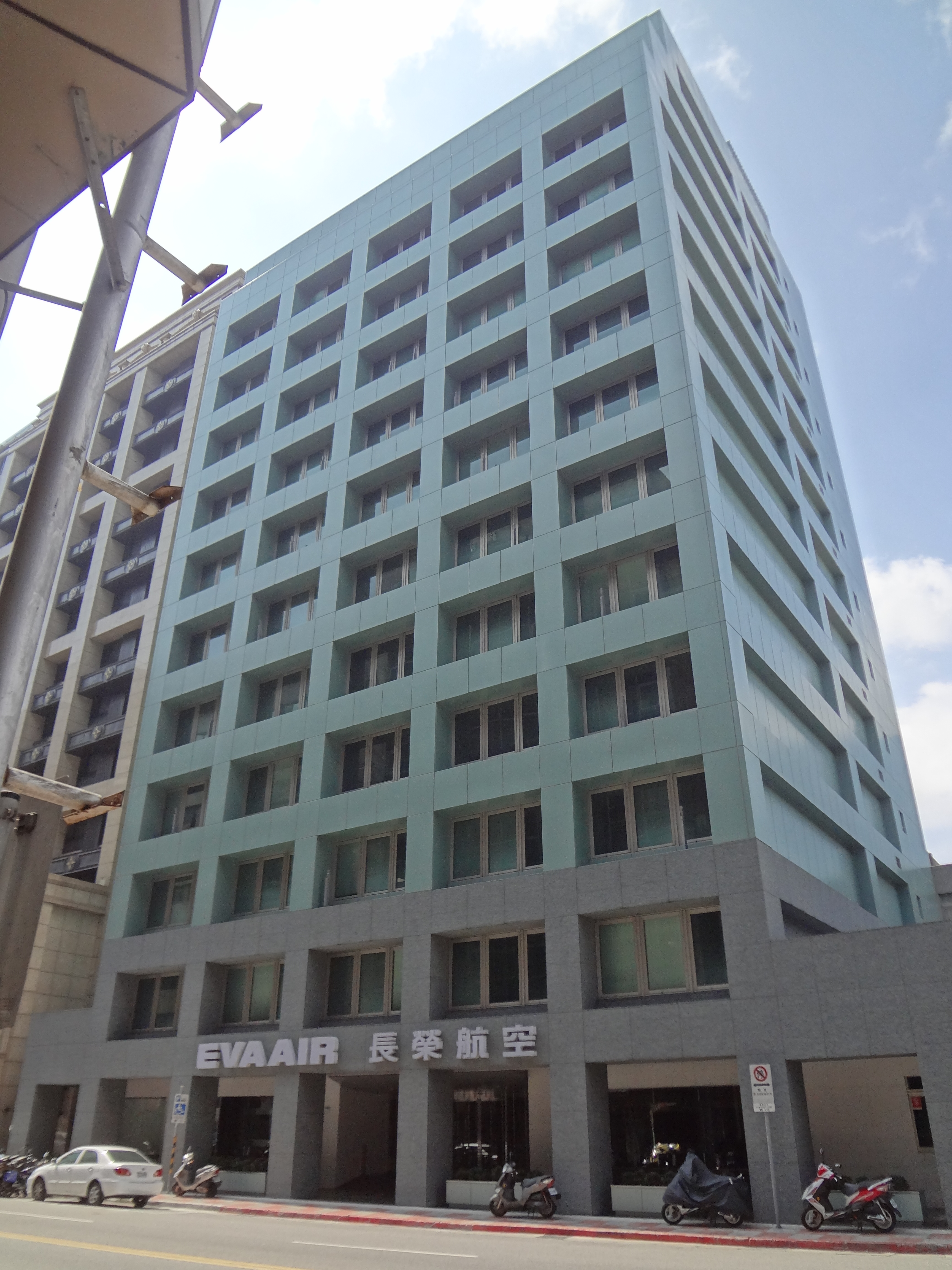 長榮航空長安大樓，位於臺北市中山區長安東路二段117號。